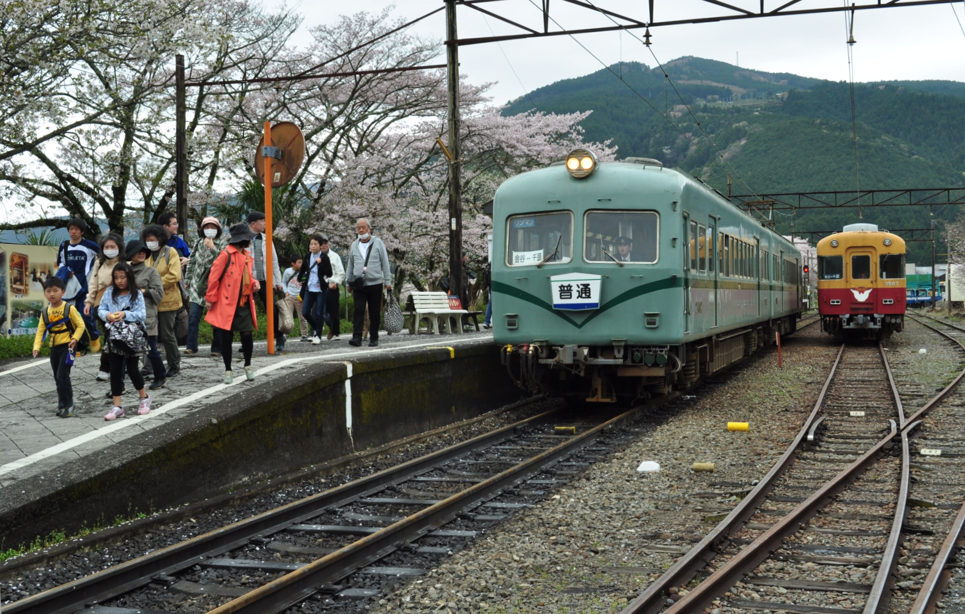 （2015年4月4日撮影）